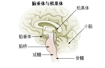 脑垂体与松果体 来源：